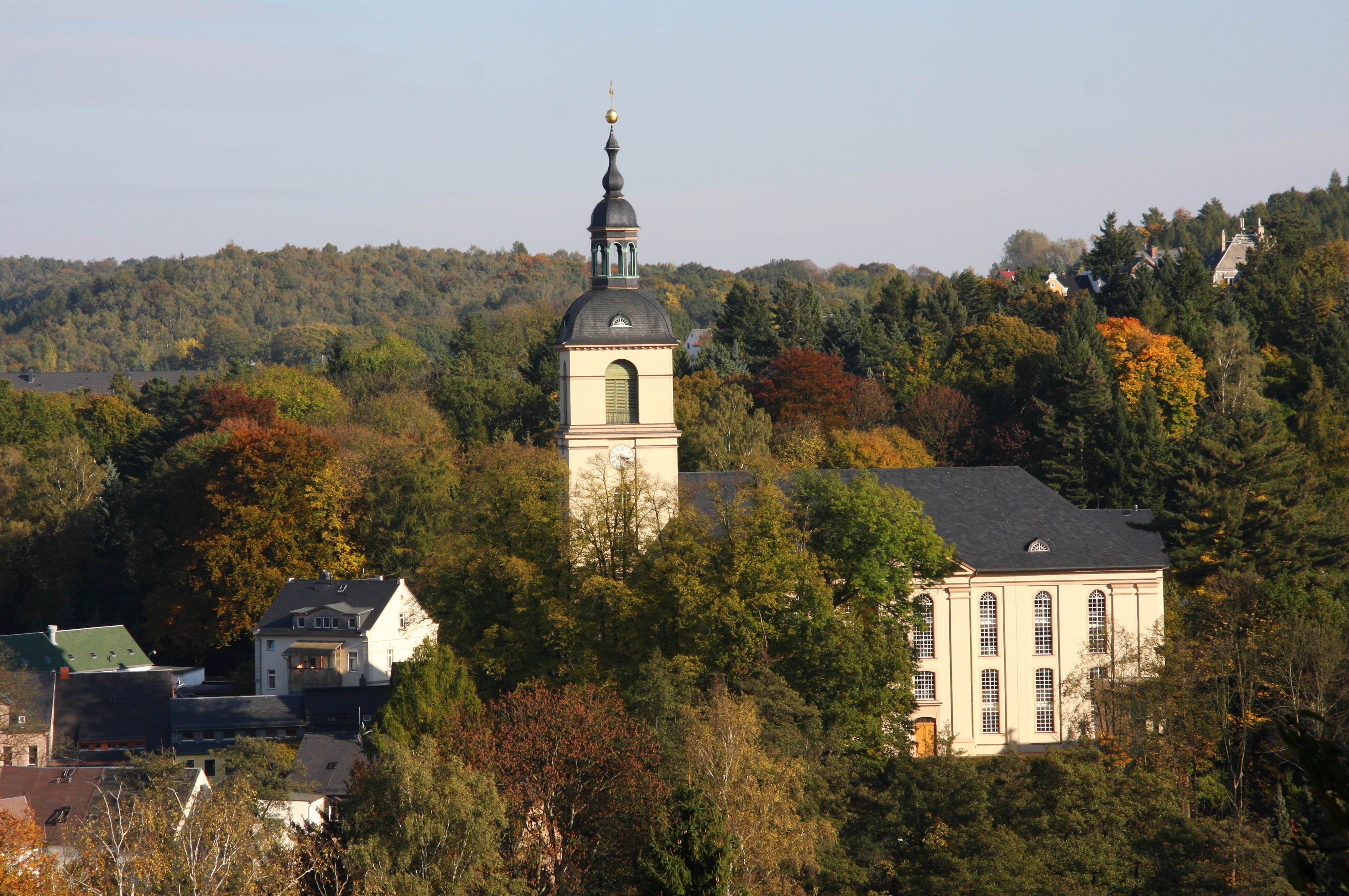 Herbst in Waldheim, St. Nicolaikirche, Oktober 2010